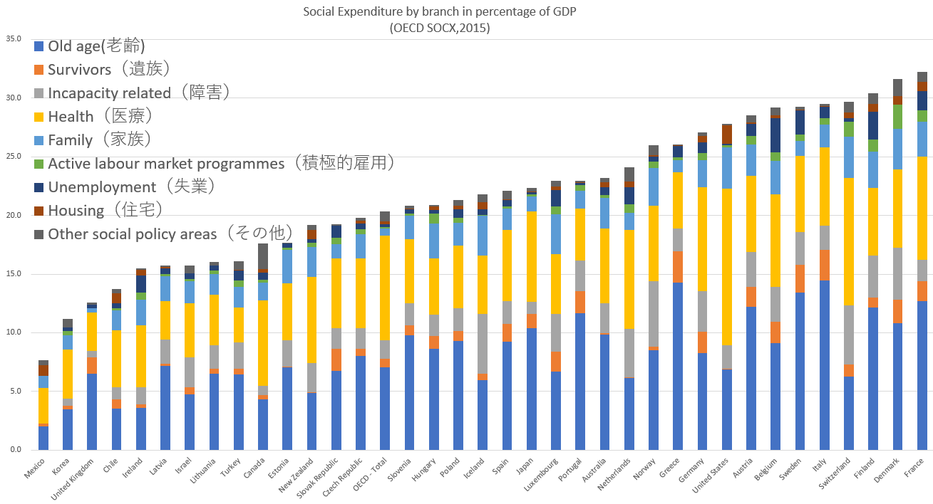 2015年のデータに更新しました。 社会保障費のGGP比は公的社会支出（Public）と義務的私的社会支出（Mandatory private）を合わせた合計値です。 OECD諸国の社会保障費のGDP比（2015年、ポーランドは2014年）です。GDP比は公的社会支出（Public）と義務的私的社会支出（Mandatory private）を合わせた合計値です。